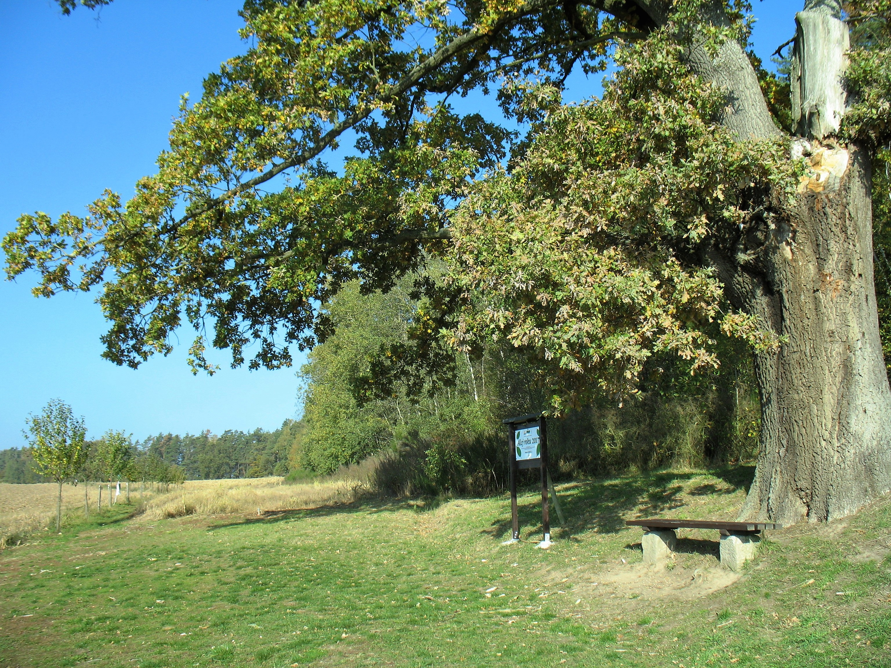 Historická Husí cesta na pomezí okresů Česká Lípa a Litoměřice. V úseku mezi Dřevčicemi a Martinskou stěnou, označovaném jako Stará Husí cesta, byla v roce 2015 vysázena alej ovocných stromů, později oceněná jako Alej roku 2017